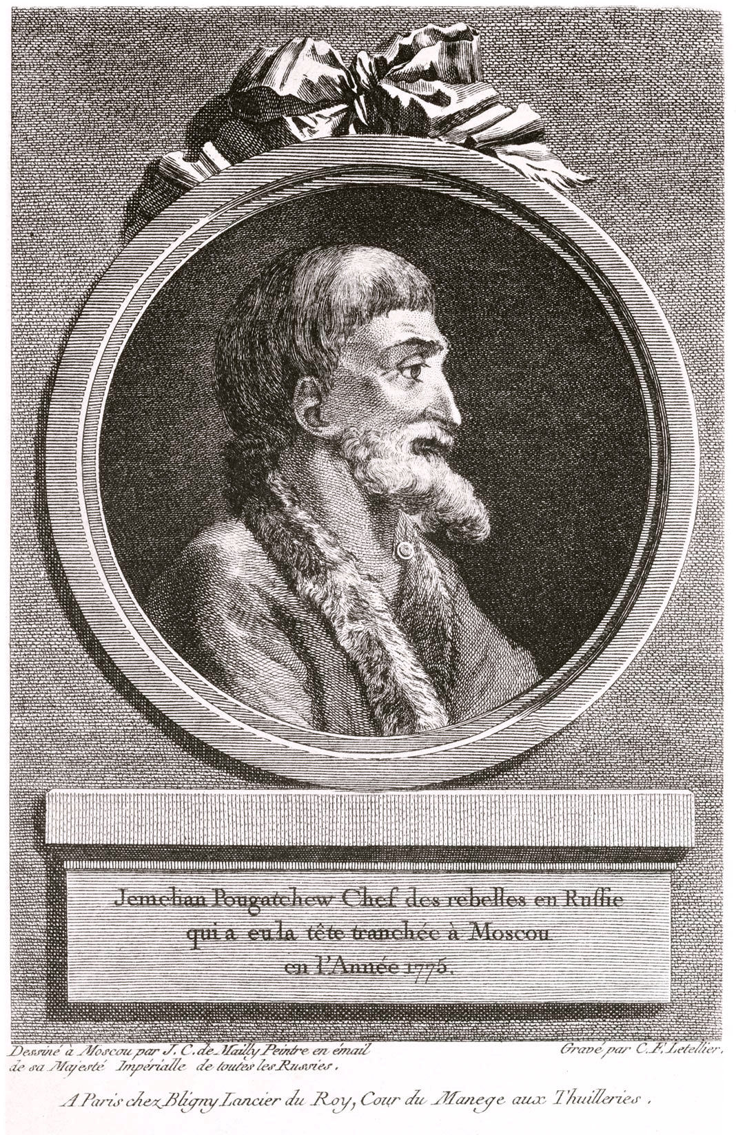 Портрет, снятый с него живописцем на эмали Мальи.